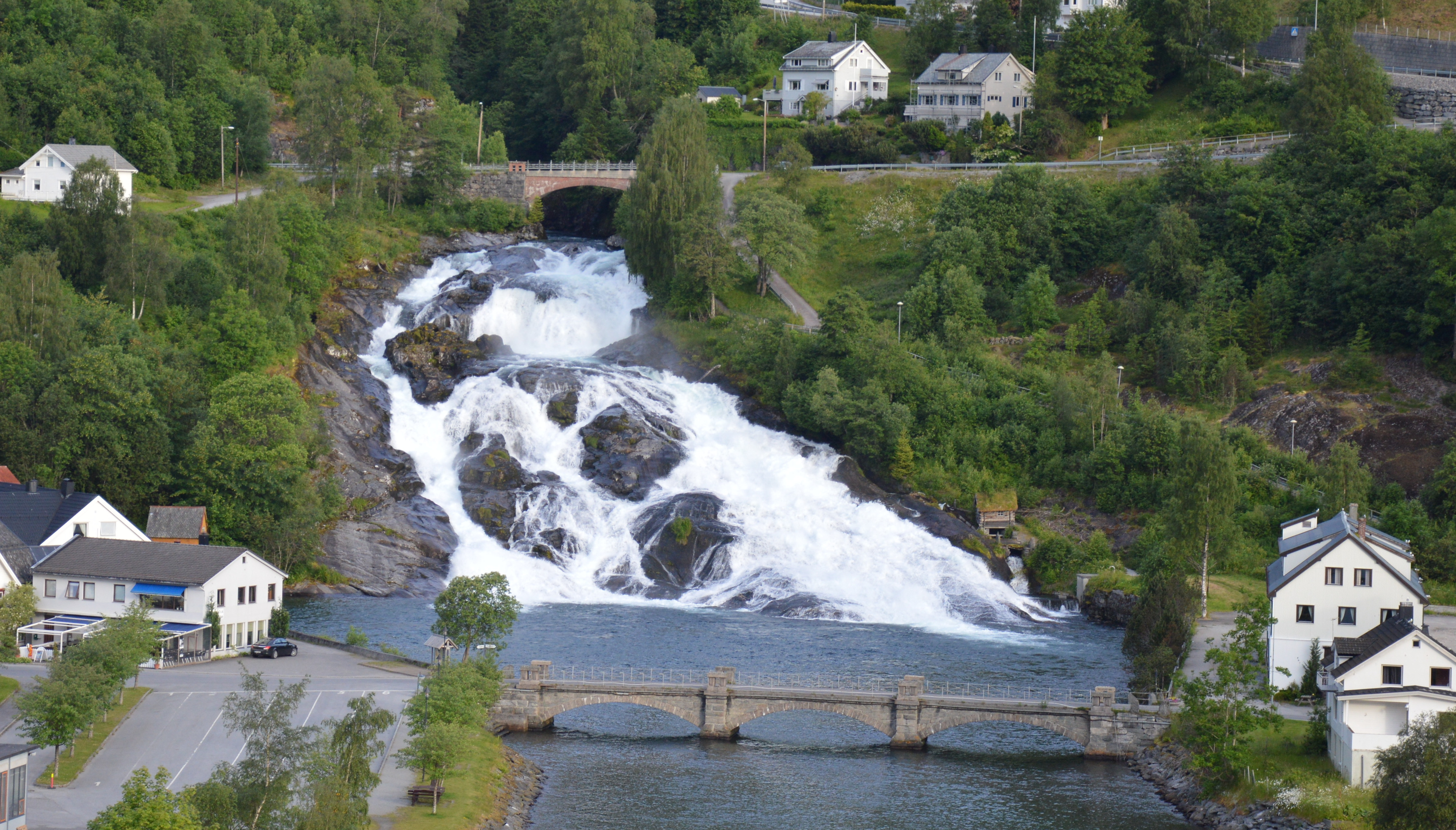 Hellesyltfossen